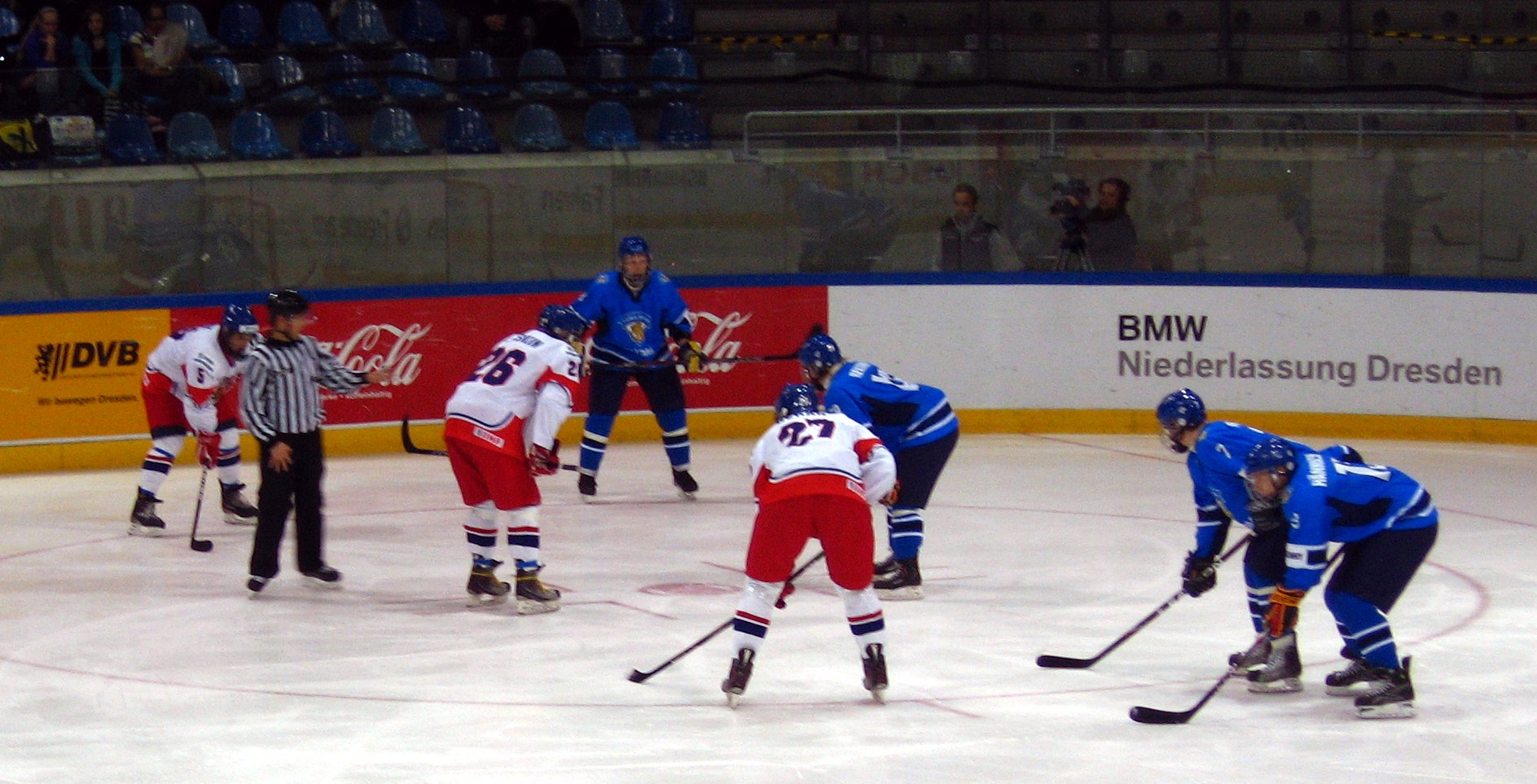 IIHF U18 WC 2011, Group B, Finland vs. Czech Republic 5:3, #26 Dimitrij Jaškin, #27 Matej Beran